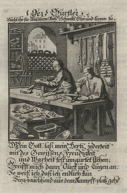 Original image description from the Deutsche Fotothek Ständebuch & Beruf & Handwerk & Kunsthandwerk & Schnalle & Gürtel & Messingschlosser